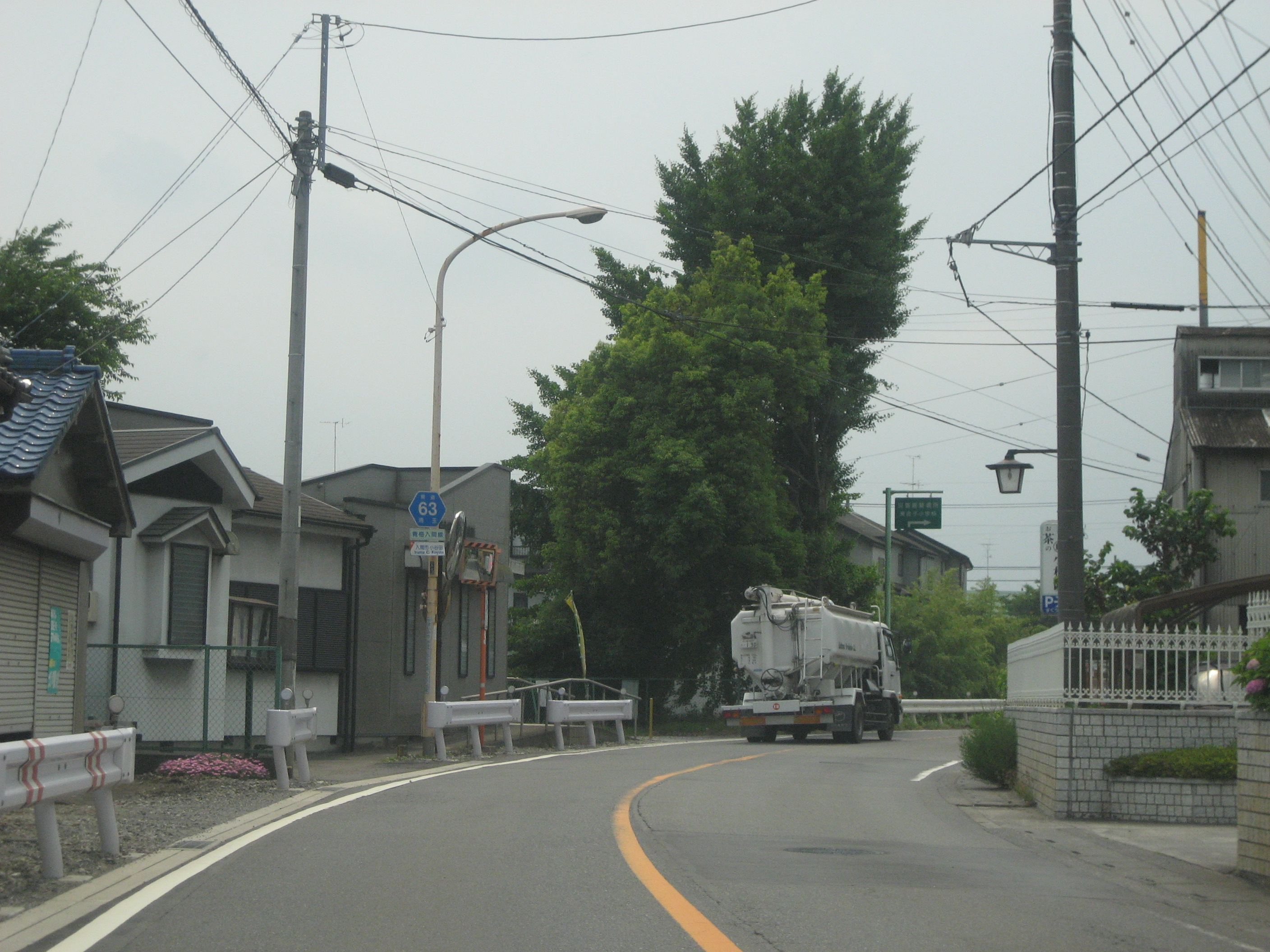 埼玉県道63号入間市内